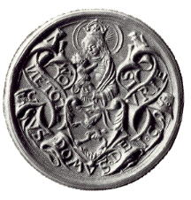 Zegel van de Gotteshausbund uit 1529